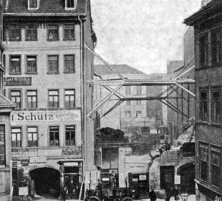 Durchbruch der Nikolaistraße zum Hauptbahnhof. Situation 1908. Links "Zum schwarzen Hufeisen", Brühl 55